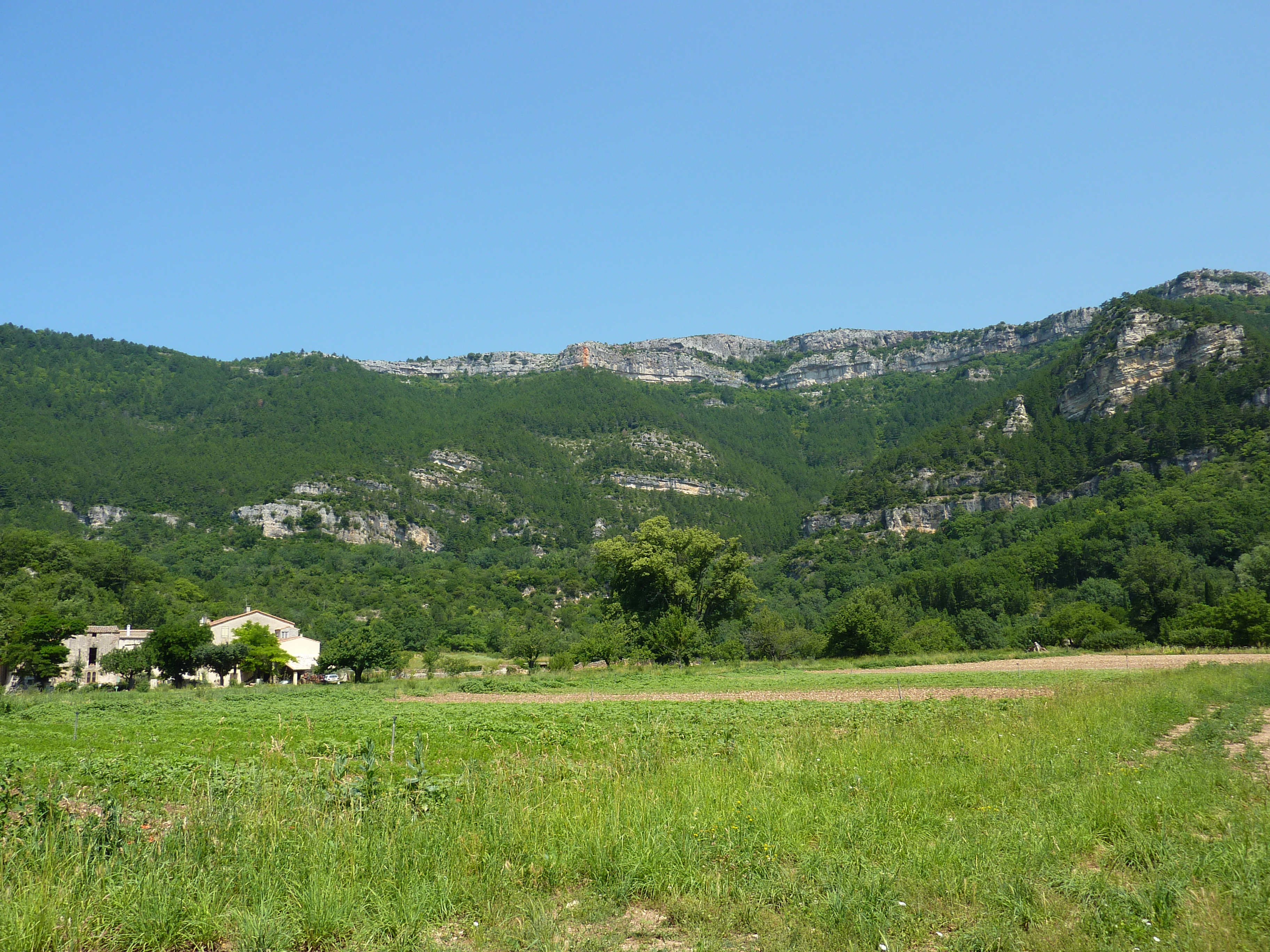 Gourgas: le "Cirque du Bout du monde"